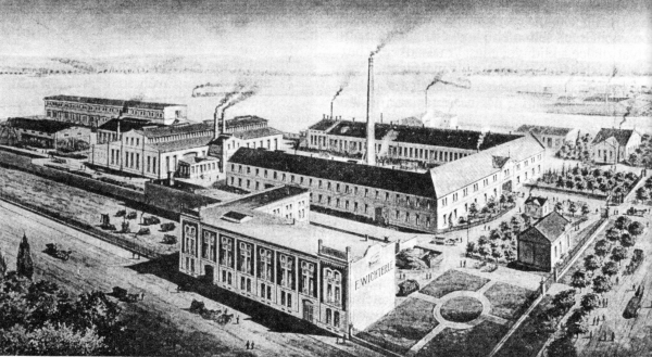 Prostějov, továrna na hospodářské stroje a slévárna firmy F. Wichterle po roce 1900